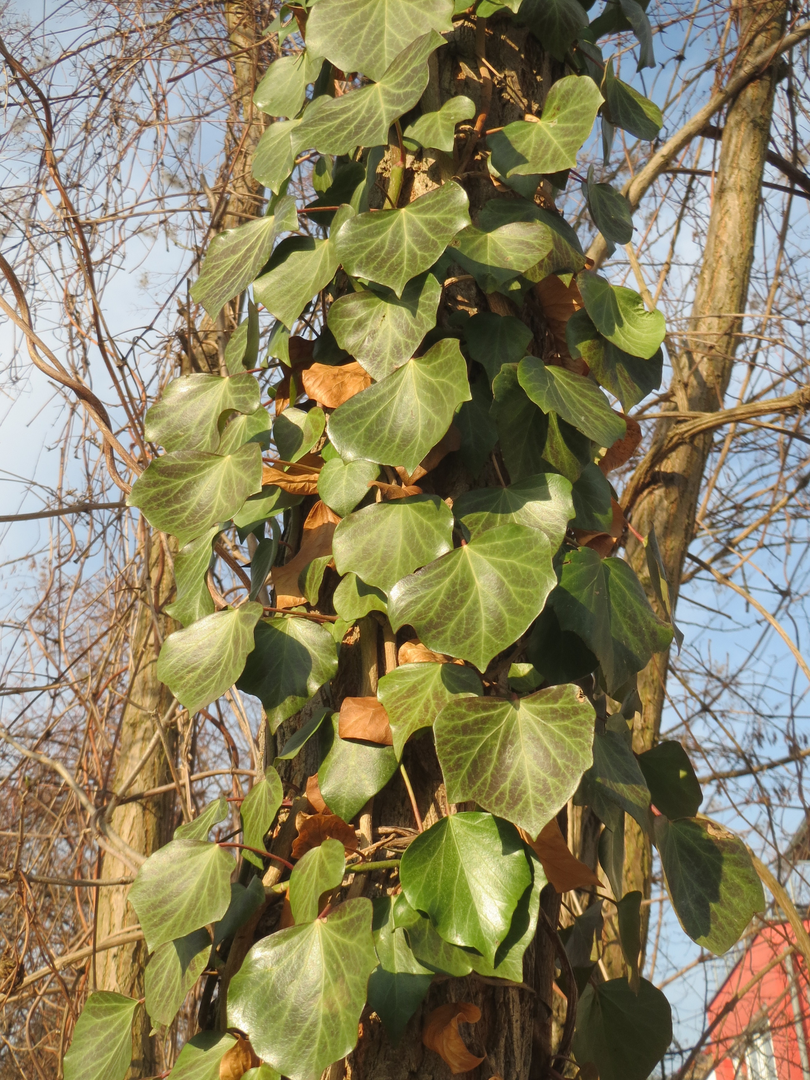 Efeu (Hedera helix) in Hockenheim